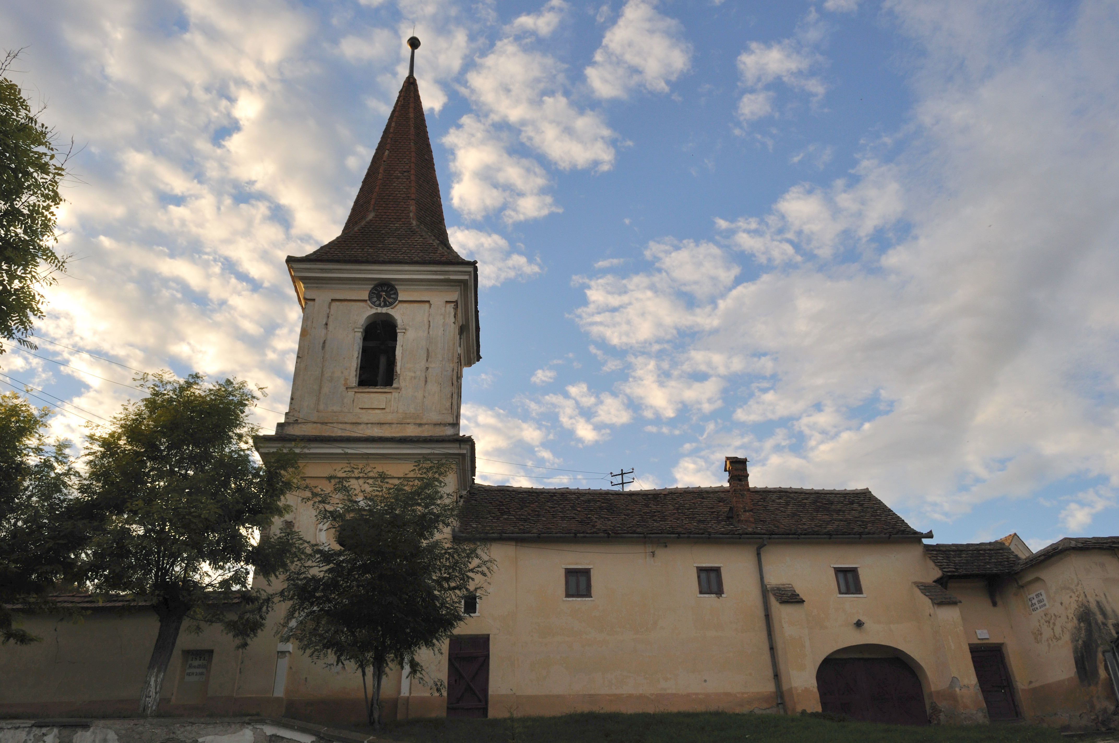 Biserica evanghelică fortificată din Șona